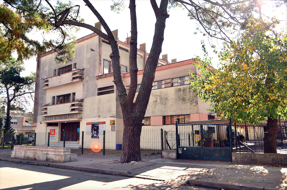 Nueva concepción de la educación plasmada en la arquitectura. Nueva manera de entender una escuela y la enseñanza en sí, que se ve reflejada en todos los componentes de esta obra. Proyecto realizado en base a tres pabellones, divididos por funciones y ubicados de tal manera que generan un conjunto con el parque en general. Se trata de un proyecto desarrollado en toda su integridad, pensado en toda la manzana, en relación con el barrio, y en todo su conjunto en sí. Debemos destacar la importancia que se le da a toda la manzana, la manera en que se logran establecer los límites físicos del proyecto, pero que permite que se extiendan más allá de los mismo, en base a la idea de parque, a la integración de la vegetación, y a la integración de un sub programa como lo es el centro cultural la experimental donde se desarrollan distintos eventos a escala barrial. Consideramos que hay un mismo lenguaje, coherente en todo el proyecto y entre cada uno de los pabellones. Juan Antonio Scasso, 1927. Crédito: Universidad ORT (